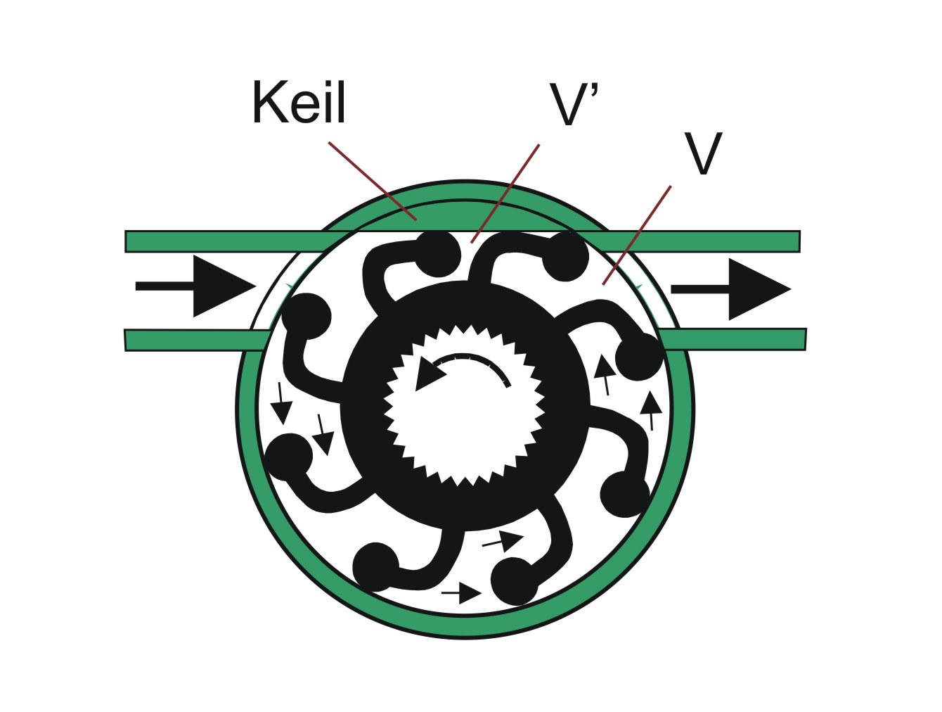 Impellerpumpe